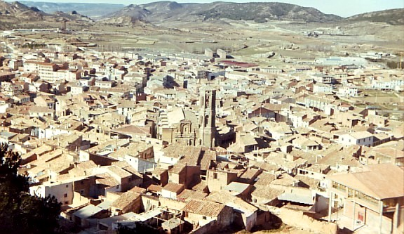 Andorra (Teruel) en 1987